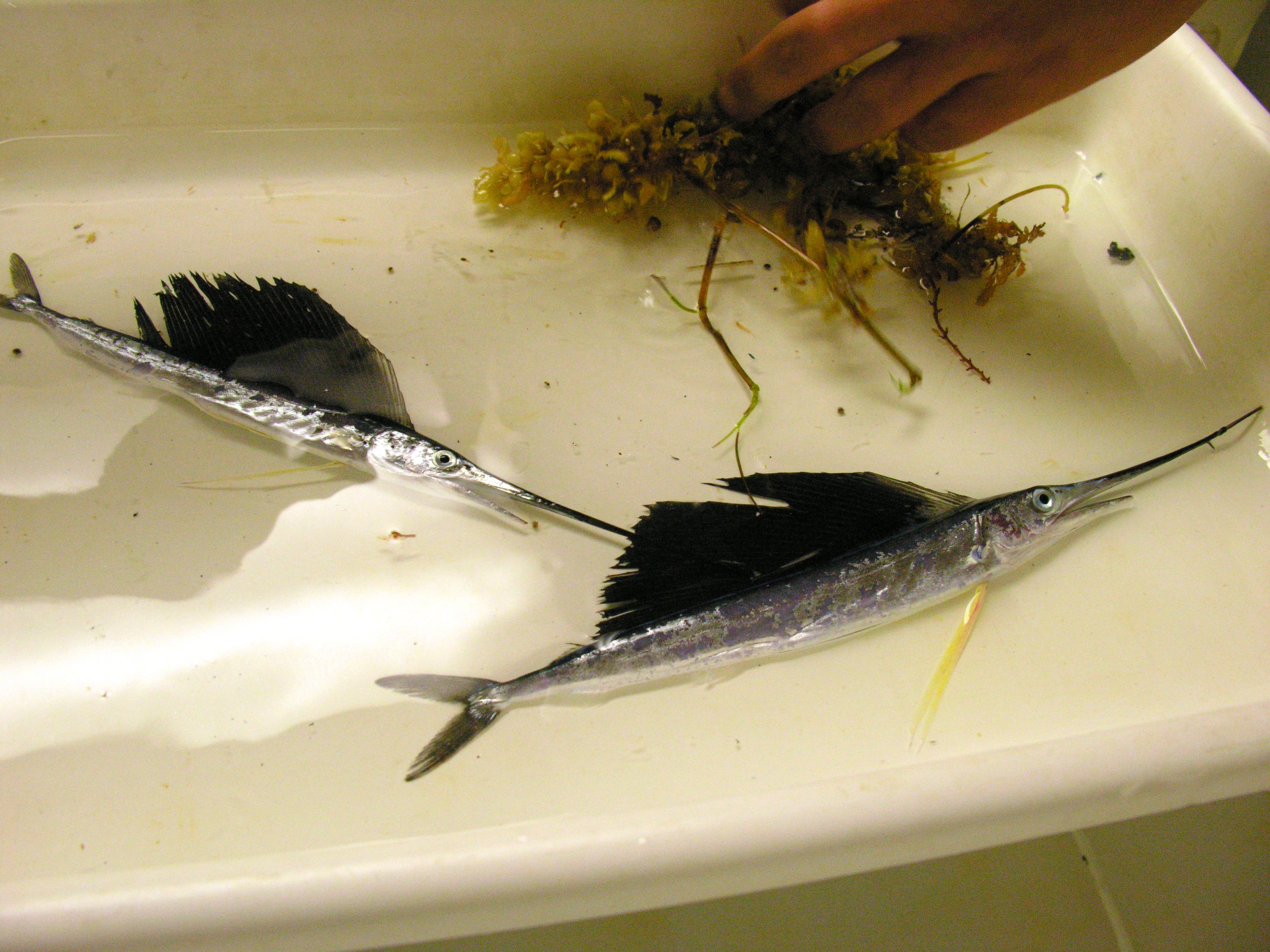 Istiophorus platypterus juvenile